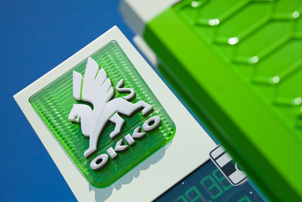 АЗК "ОККО", стела, грифон